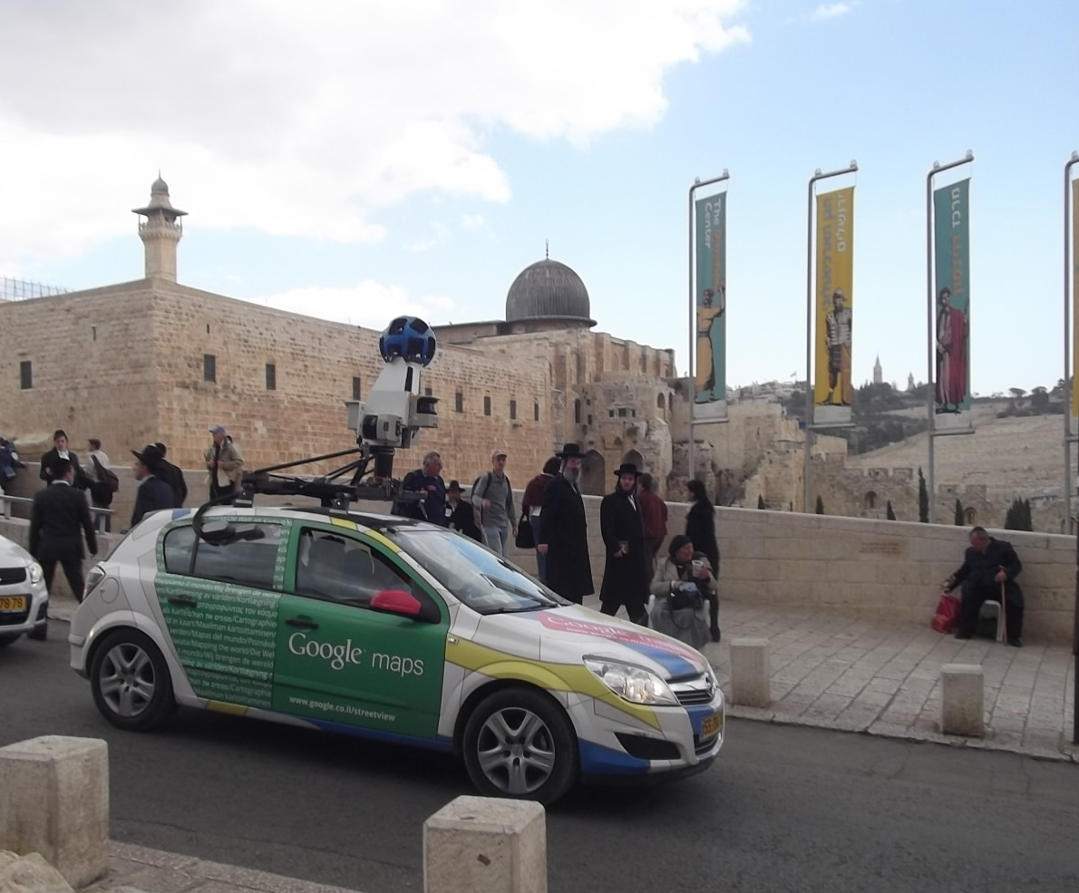 Google street view near al aqtsa